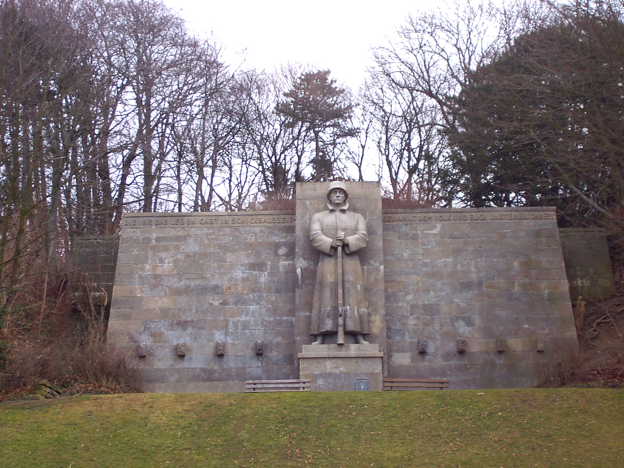 Kriegerdenkmal von August Waterbeck am Galgenberg in Hildesheim, Vorderseite